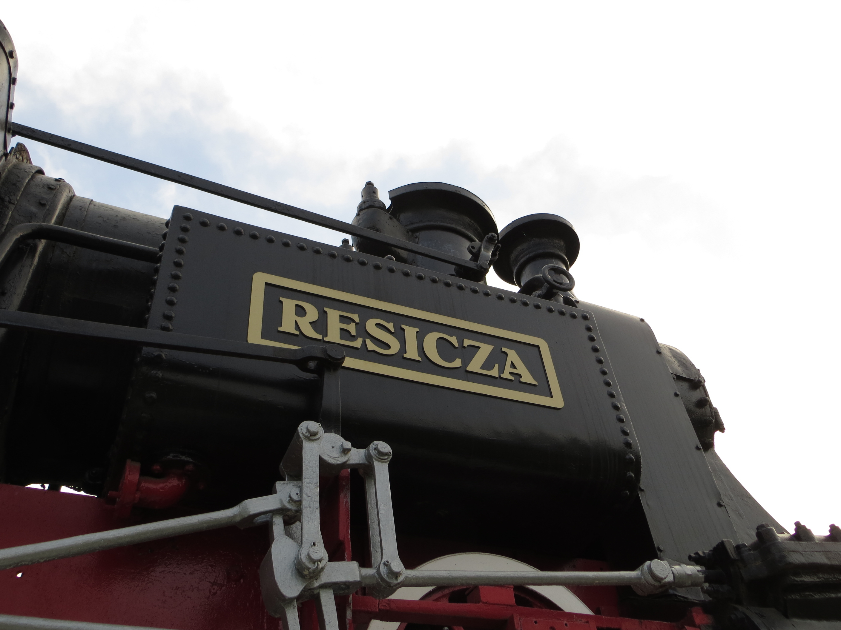 Muzeul locomotivelor cu abur, Reșița